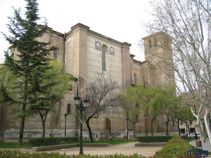 Valladolid – España (Spain) – Iglesia de la Magdalena: Fue reedificada en el año 1566 siguiendo los planos del arquitecto Rodrigo Gil de Hontañón. Es de destacar en su fachada de estilo renacentista, con el inmenso escudo en piedra del pacificador del Perú, el obispo Pedro de la Gasca. La iglesia es de una sola nave con bóvedas de crucería. Las esculturas del retablo fueron realizadas entre los años 1571 y 1575 por Esteban Jordán.